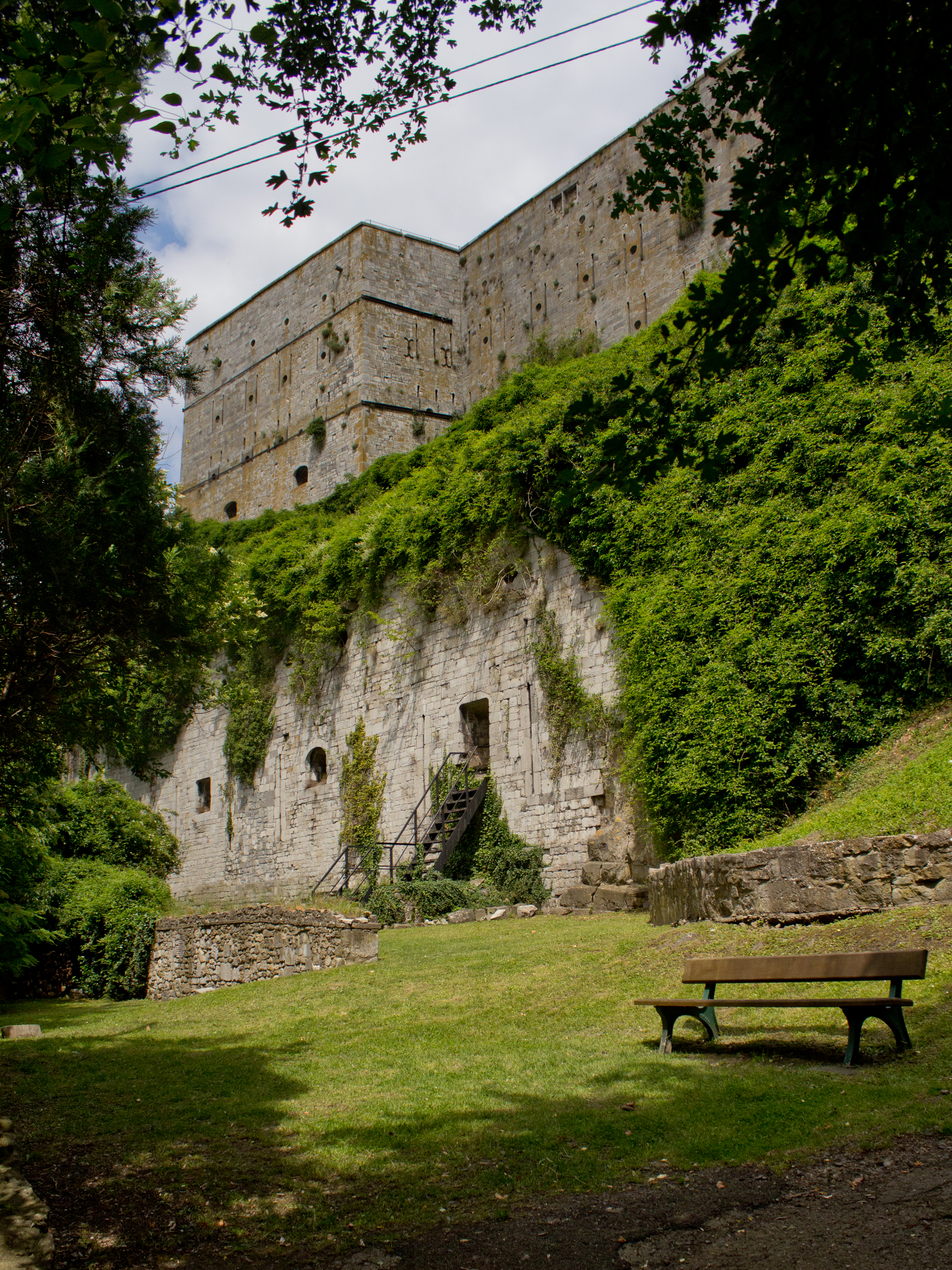 Het fort van Huy